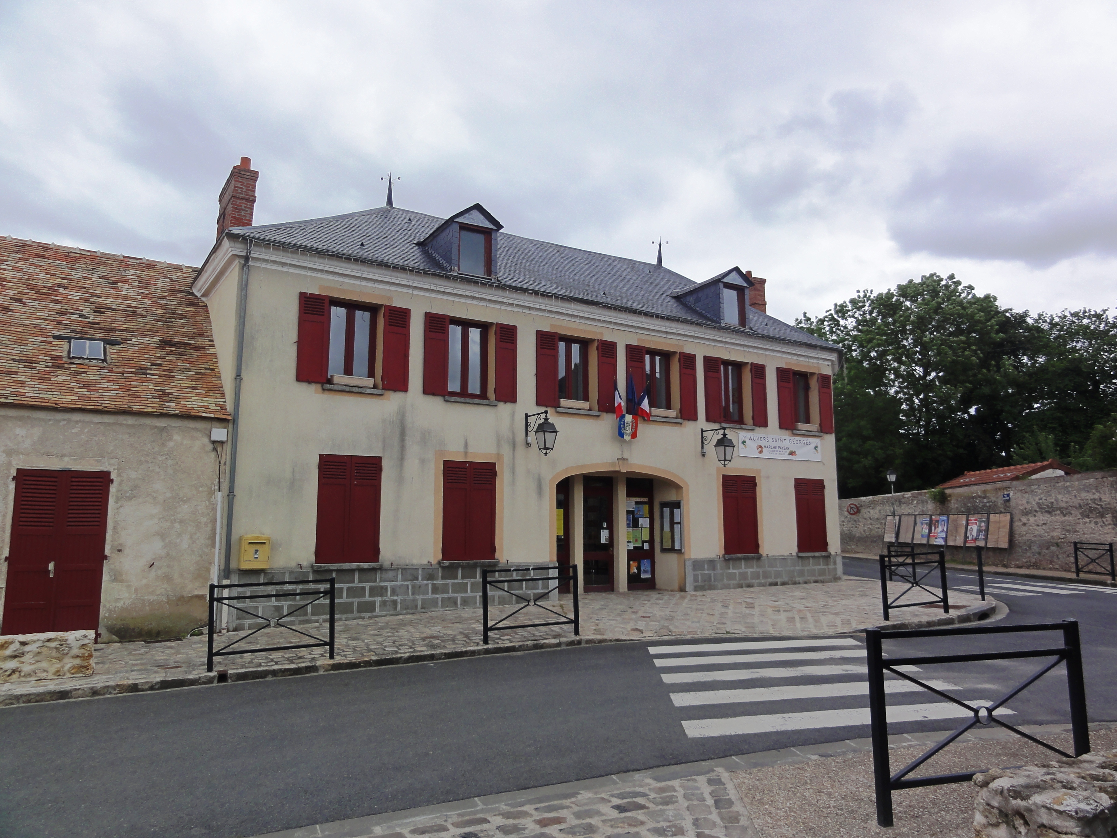 Auvers-Saint-Georges (Essonne) Mairie